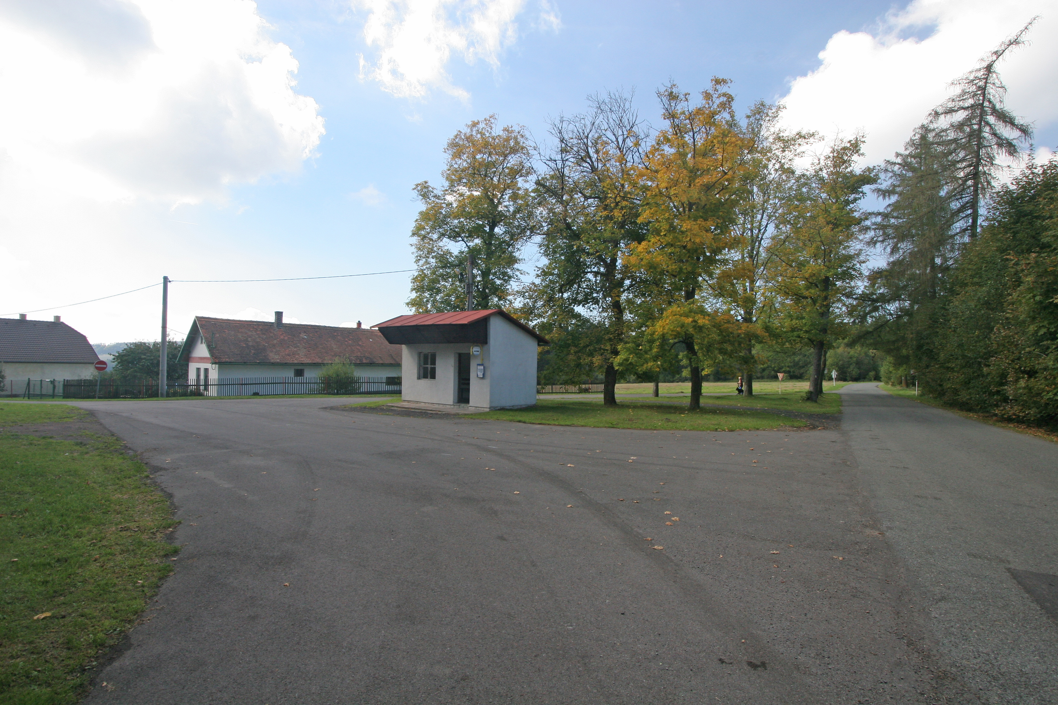 Míčov zastávka autobusu